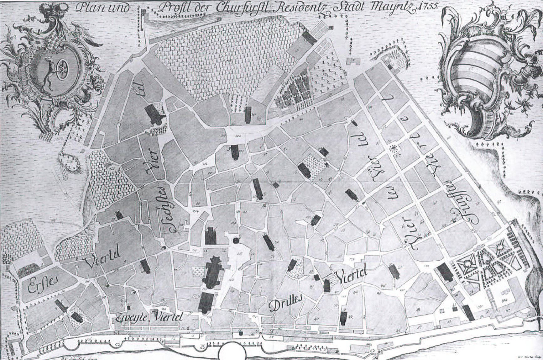 Mainz, Plan und Profil der Churfürstl. Residentz Stadt Mayntz 1755. Altkolorierter Kupferstich, 62 x 78,5 cm. Thieme-Becker, Künstler-Lexikon, Bd. XXIX, S. 163f. - W.C. Rücker (gest. 1774 in Mainz) war Zeichner u. Kupferstecher. - Er wurde 1750 vom Concilium majus der Mainzer Universität als privilegierter Universitätskupferstecher angenommen. - Das Blatt zeigt im oberen Viertel einen Stadtplan. - Oben links u. rechts große Wappenkartuschen. - Unter dem Stadtplan Gesamtansicht von Mainz. - Am gesamten linken Rand Verzeichnis der Stifte, Klöster, Kirchen, Klosterhospitäler u. Kapellen.